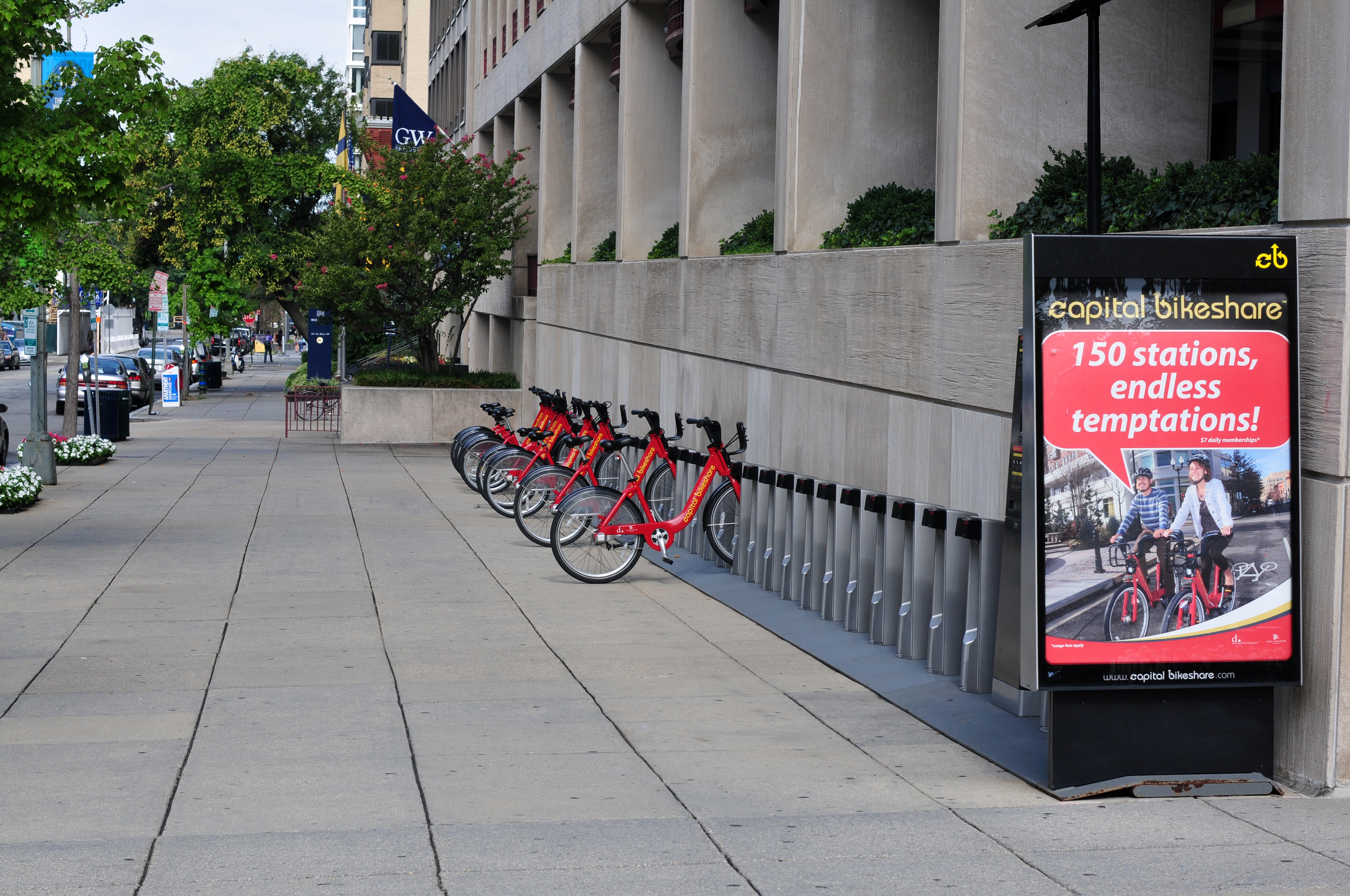 Impressionen Wikimania Washington D.C. 2012 The making of this work was supported by Wikimedia Austria. For other files made with the support of Wikimedia Austria, please see the category Supported by Wikimedia Österreich.